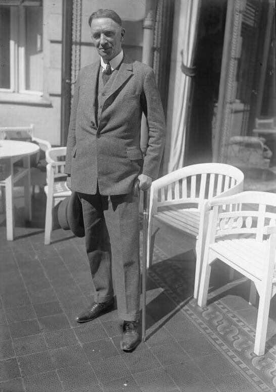 Der berühmte russische Prof. und Arktisforscher Dr. Leonid Breitfuss weilt augenblicklich in Berlin! Prof. Dr. Leonid Breitfuss, der berühmte russische Forscher im Hotel Bristol in Berlin.